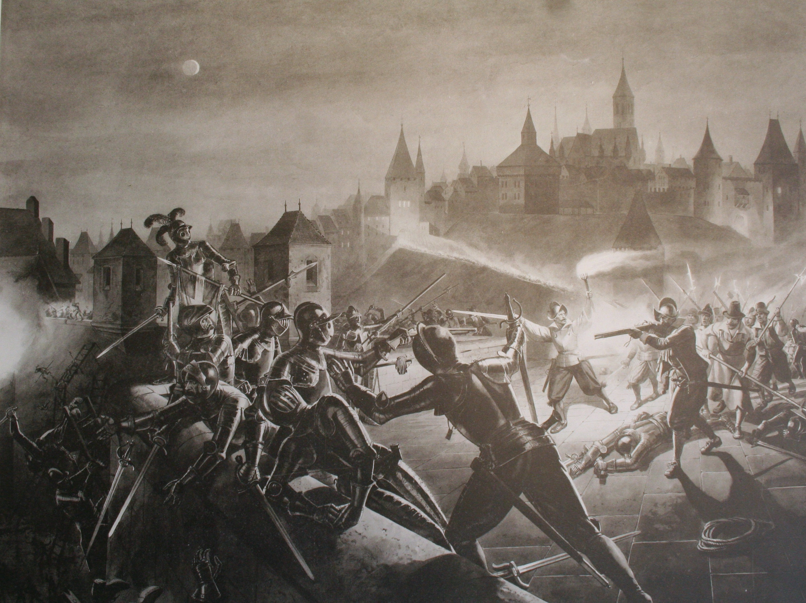 Escalade in Genf, 11. zum 12. Dezember 1602